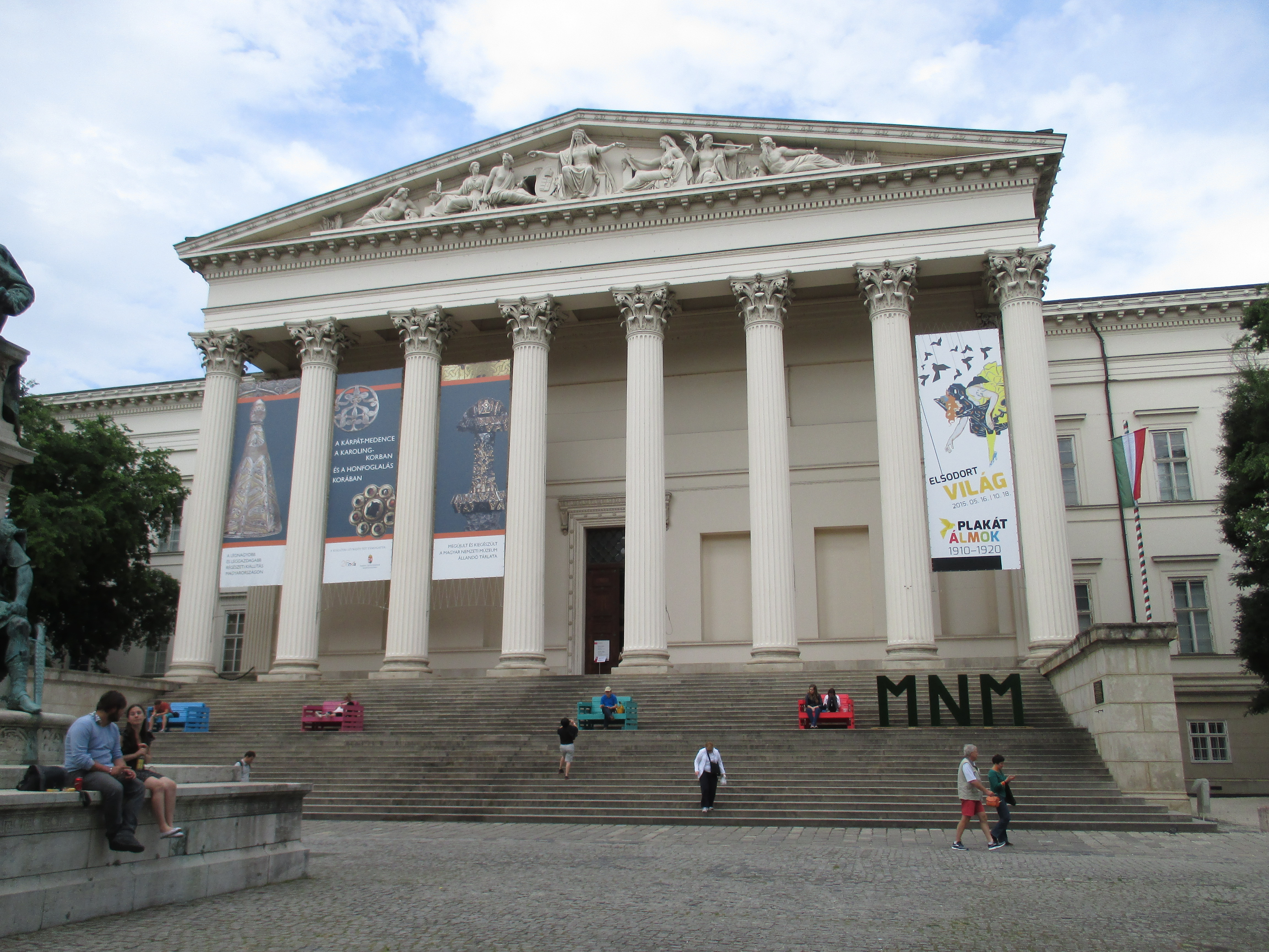 A Magyar Nemzeti Múzeum főhomlokzata, Budapest